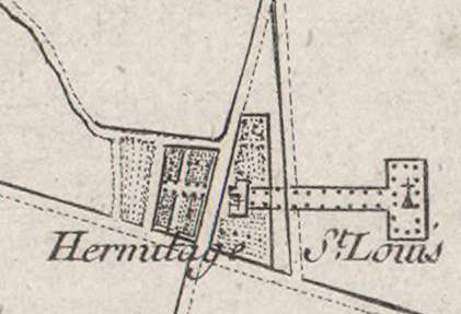 Carte de l'Ermitage de Sénart en 1750, détail du "Réduction du tableau topographique de la forest de Senart présentée à Monsieur pour le Service de ses chasses et Promenades, par son très humble et très respectueux serviteur Dom Coutans, Bénédictin de l'Abbaye de Lagny"